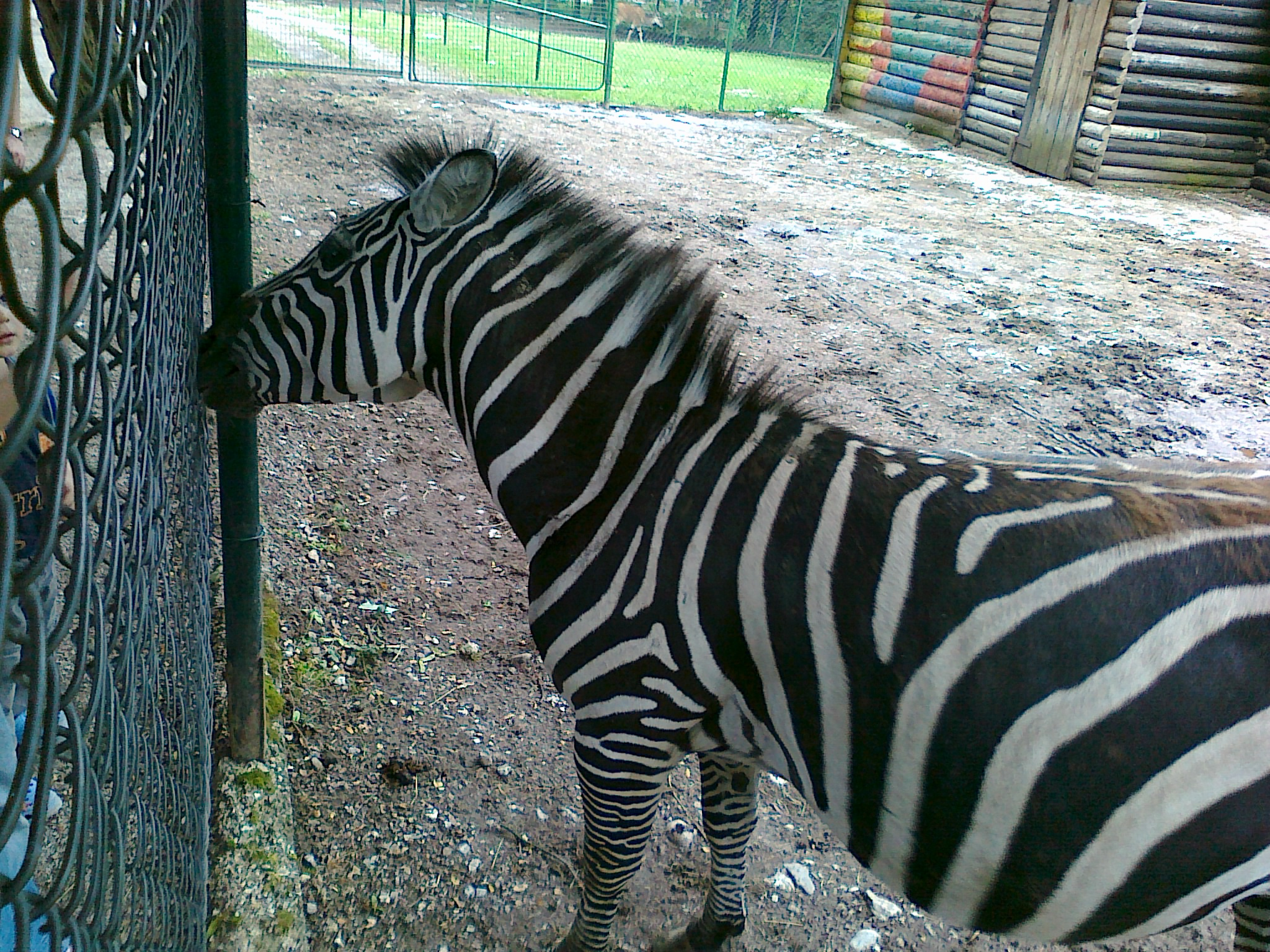 Zebra in Pionirska dolina